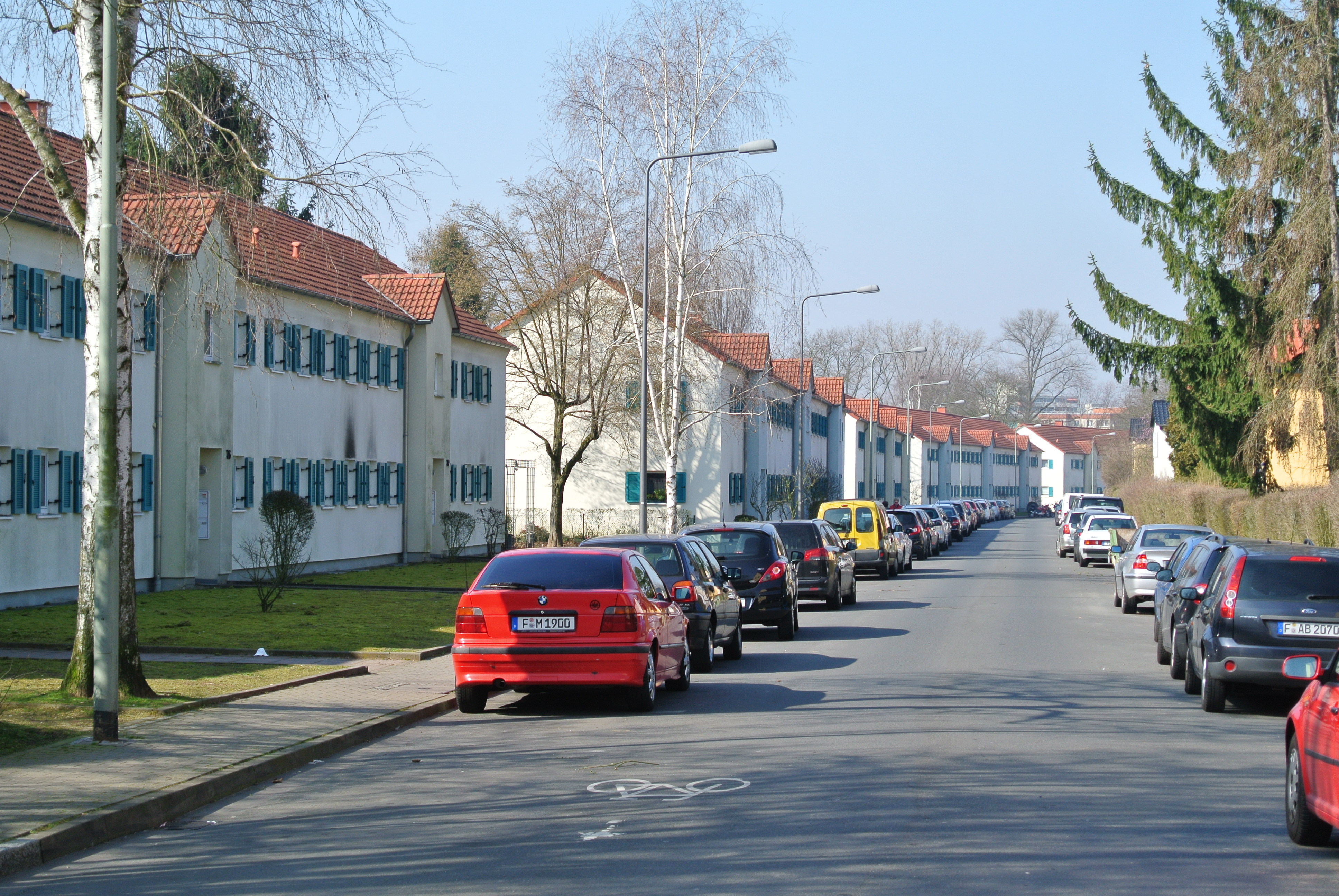 Bizonale Siedlung in Frankfurt-Griesheim-Nord von ca. 1948